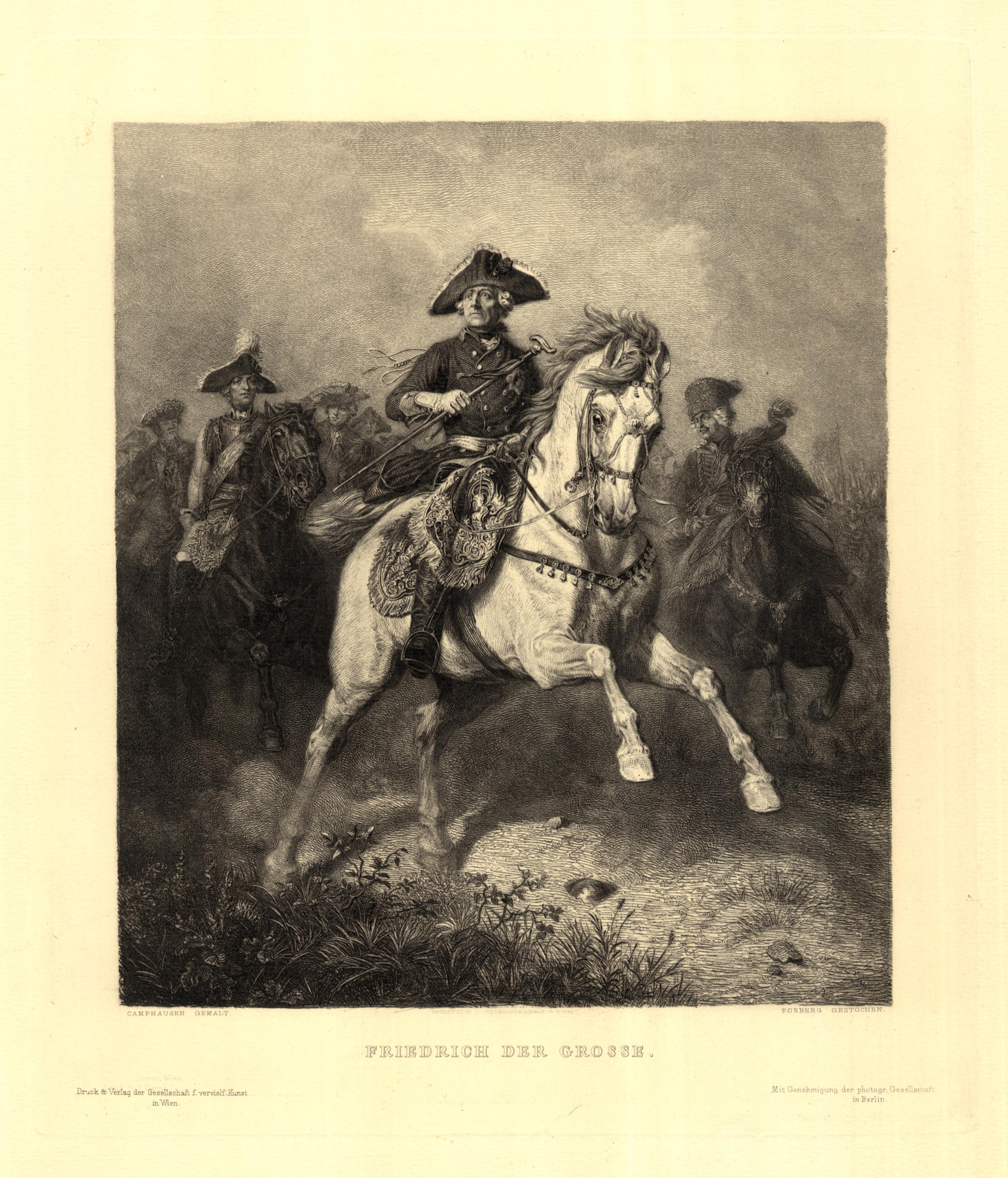 "Der grosse Kurfuerst“. Radierung von Carl Ernst Forberg nach dem Gemaelde von Wilhelm Camphausen. Auf kartoniertem Papier mit Praegestempel der "Gesellschaft für Vervielfaeltigungskunst Wien". Im Plattenrand unten links gestochen bezeichnet "Camphausen gemalt", unten rechts bezeichnet "Forberg gestochen", in der Mitte betitelt. Um/nach 1872. 27,5:23cm. Blattgroesse 48,7:36 cm